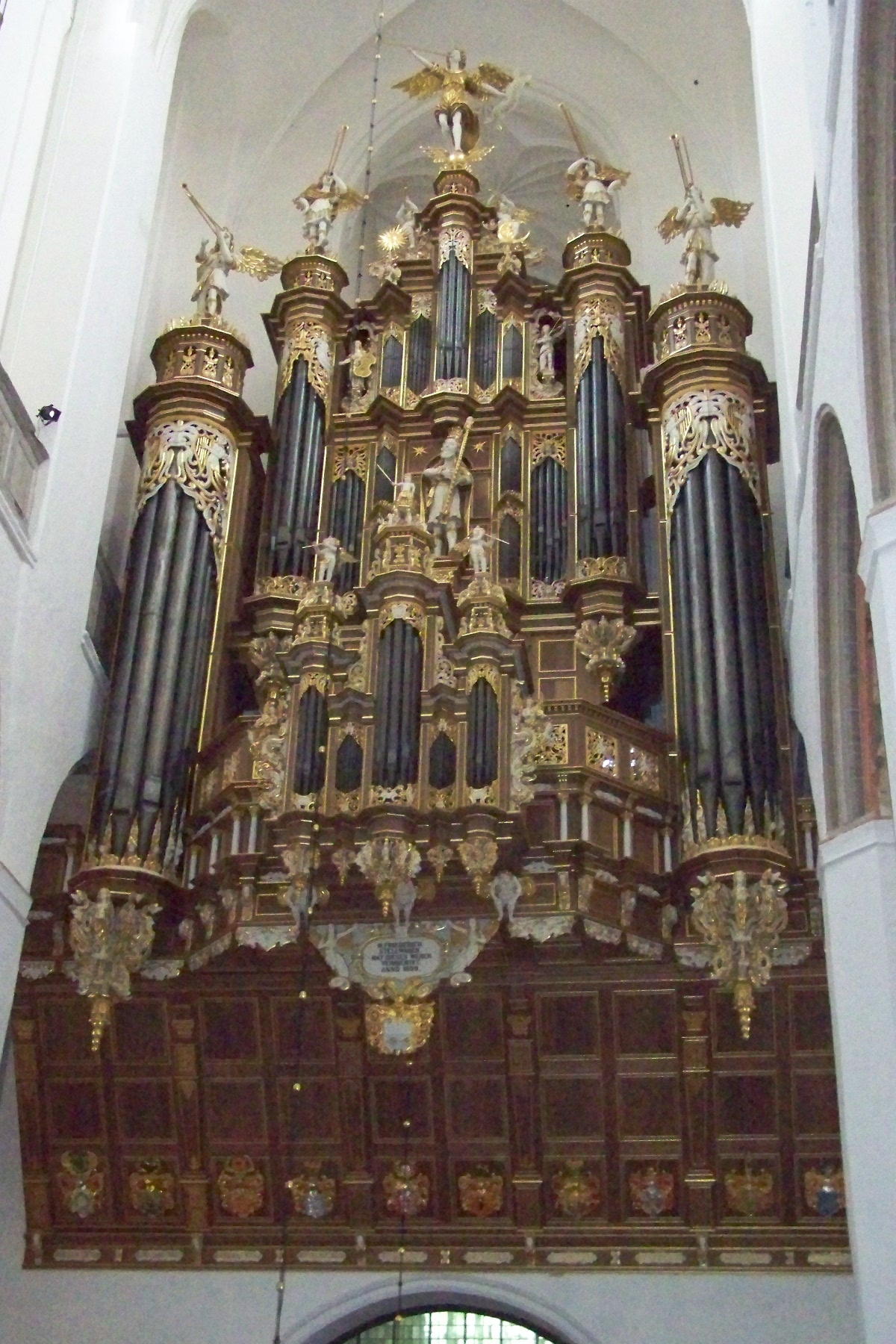 Stralsund, Marienkirche, Stellwagen-Orgel -1- (2008-10-02).JPG